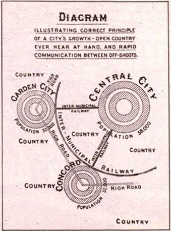 Lorategi-hiriaren eskema, 1902.